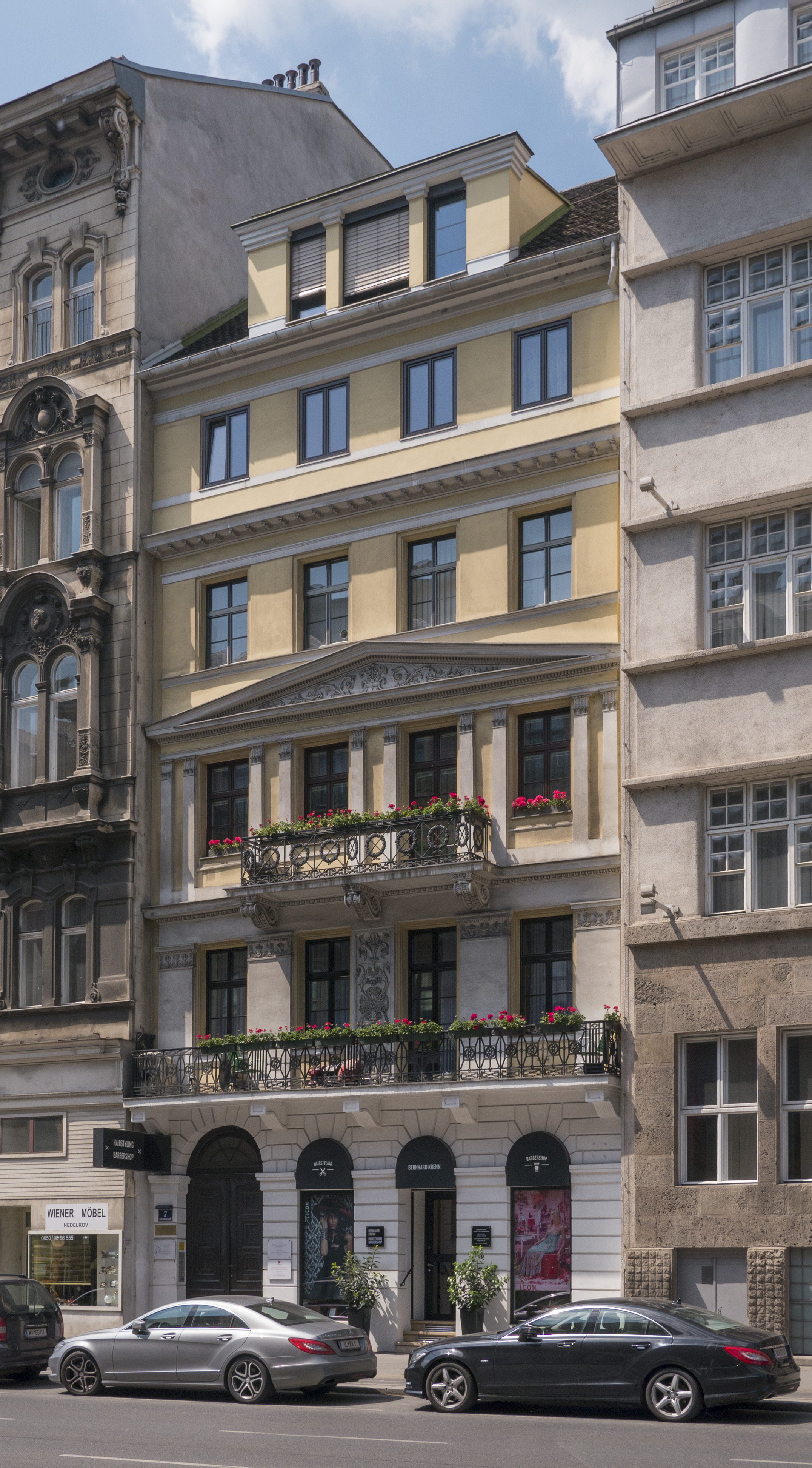 Miethaus, Zur kleinen Maria Hilf, Bildhauerhaus